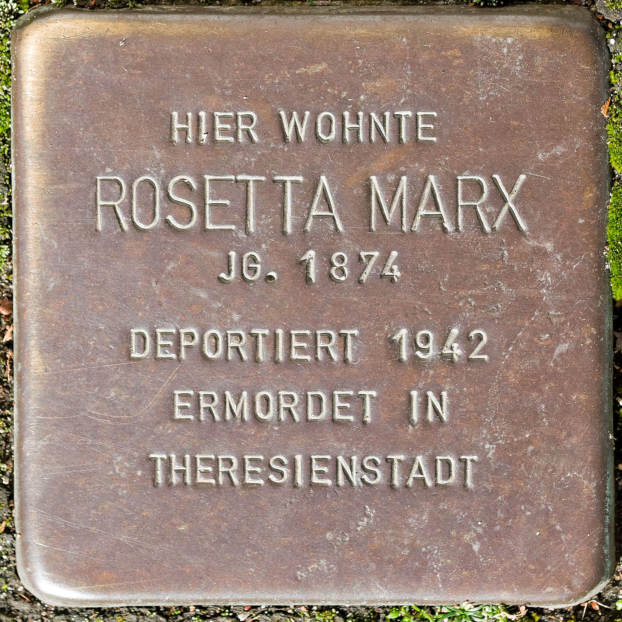 Stolpersteine in Viersen: Marx, Rosetta